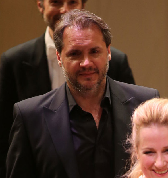 Diana Damra, Sopran